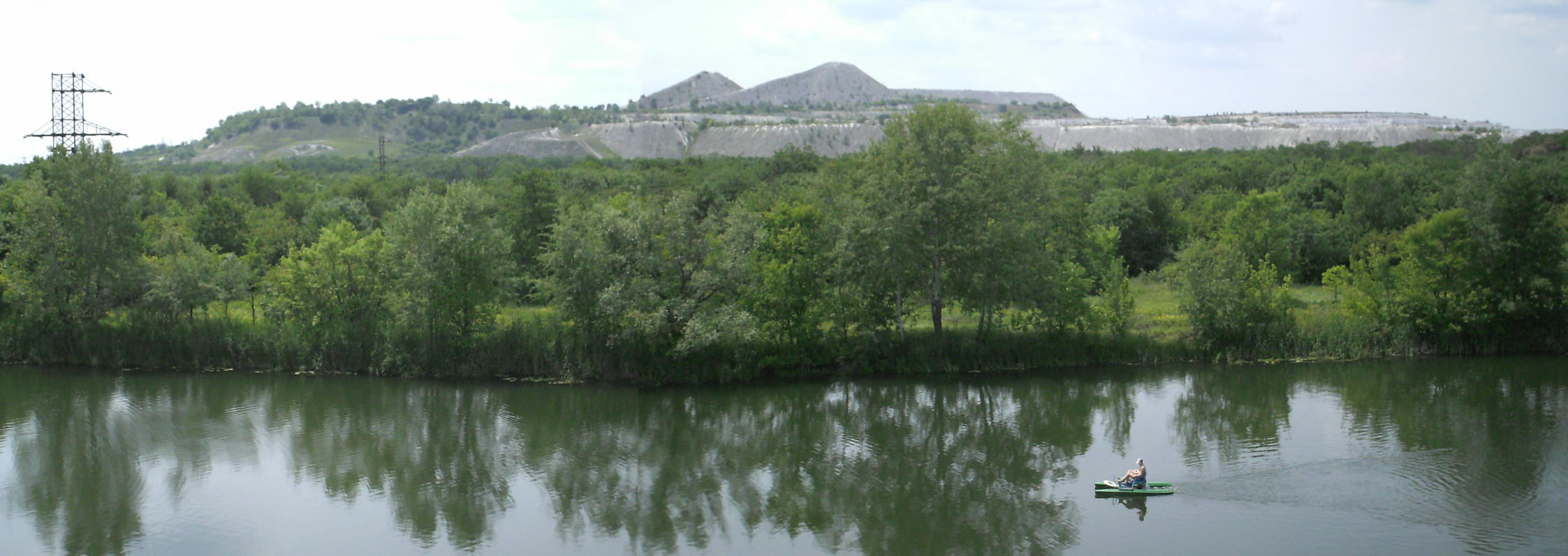 крейдяні терикони поблизу Райгородка Словянського району, вид з Щурова на протилежному березі Сіверського Донця